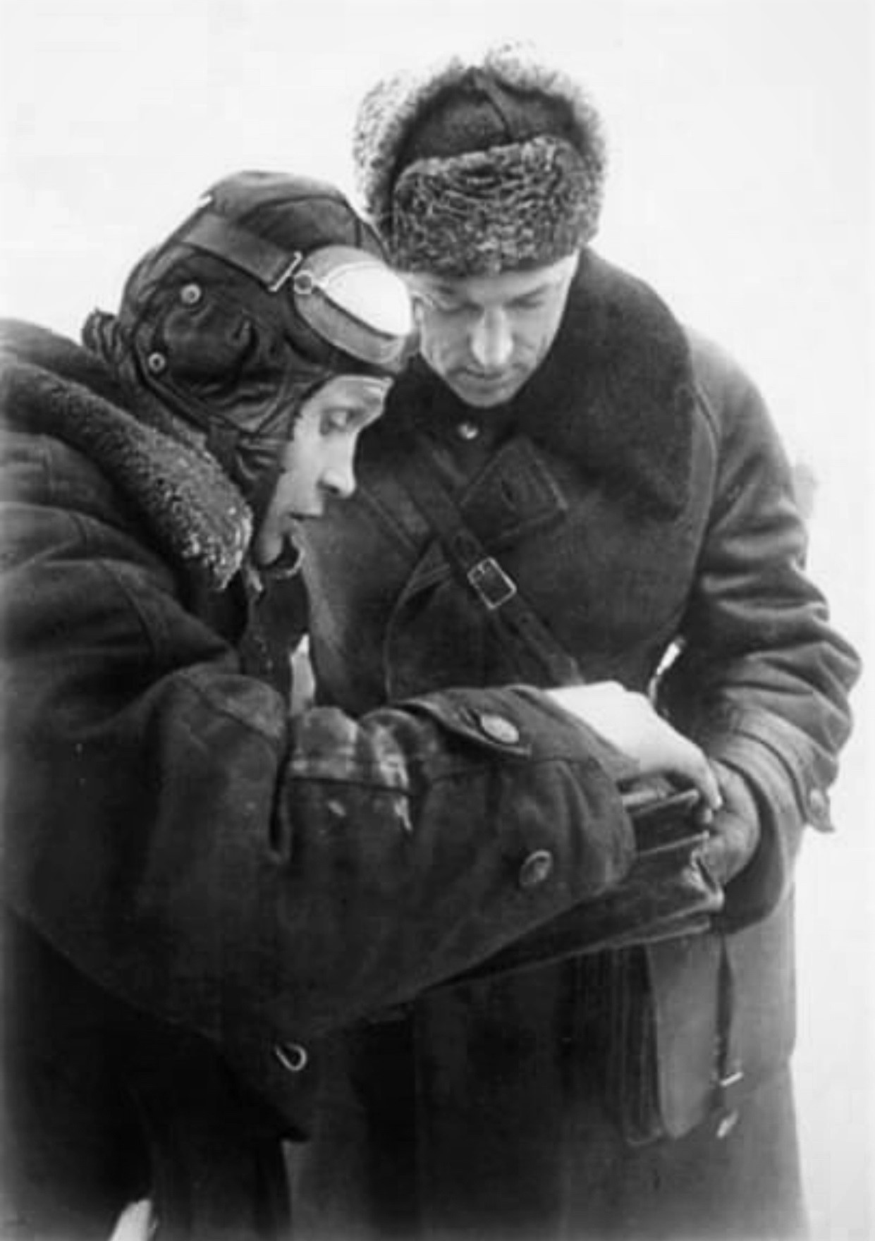 Западный фронт. Командующий 16-й армией К.К. Рокоссовский изучает карту с результатами воздушной разведки в ходе контрнаступления под Москвой